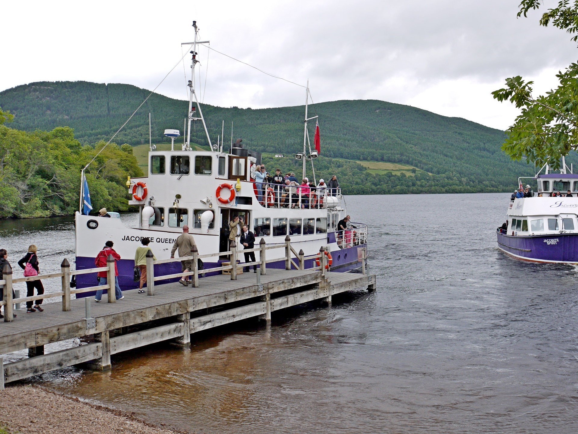 De nonbreuses excursion sur le Loch Ness et vers le Chateau d'Urquhart partent d'inverness. On voit ici le débarcadaire du chateau d'Urquhart.